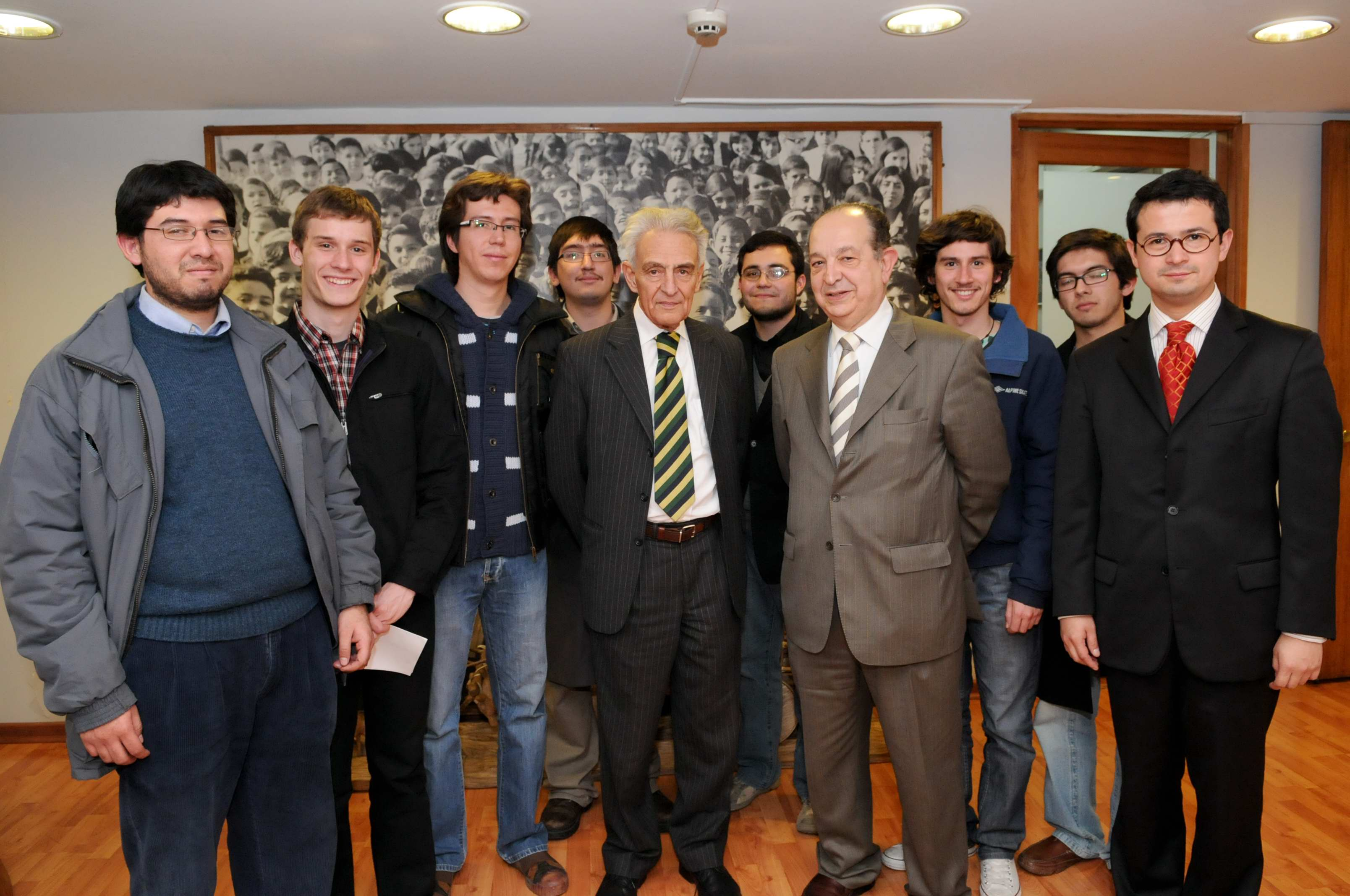 Fotografía tomada al momento de la entrega del Premio Nacional de Historia al Bernardino Bravo Lira, en compañía del Decano de la Facultad de Derecho de la Universidad de Chile, Sr. Roberto Nahum y de su grupo de ayudantes.